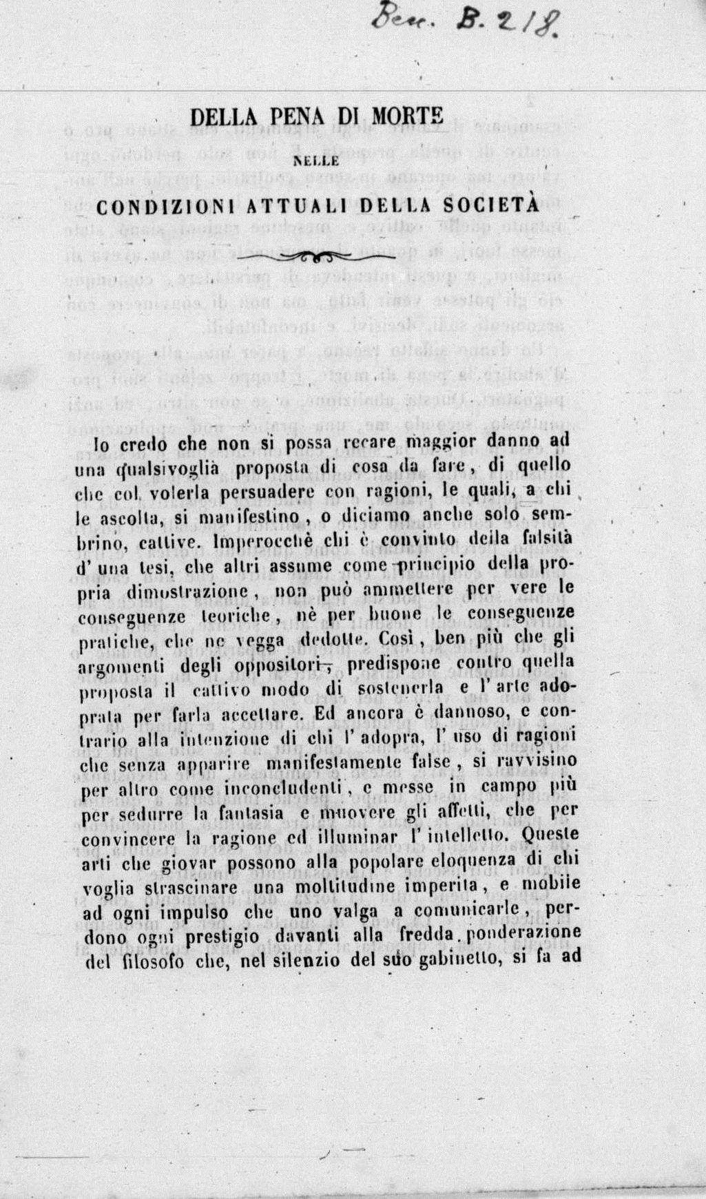 pagina